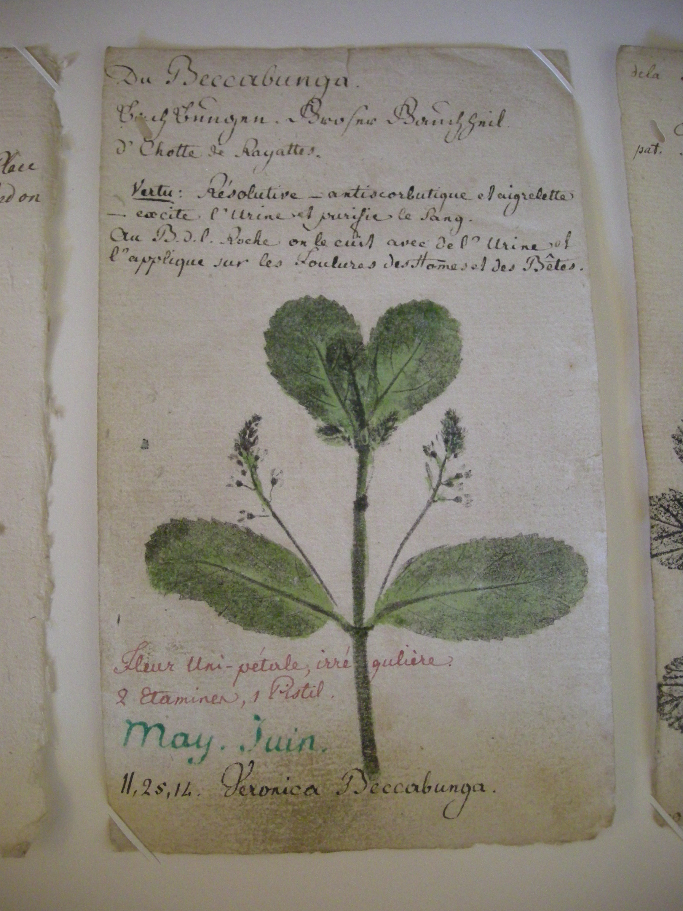 Veronica beccabunga, fiche botanique élaborée par le pasteur Jean-Frédéric Oberlin - Musée Jean-Frédéric Oberlin à Waldersbach (67)